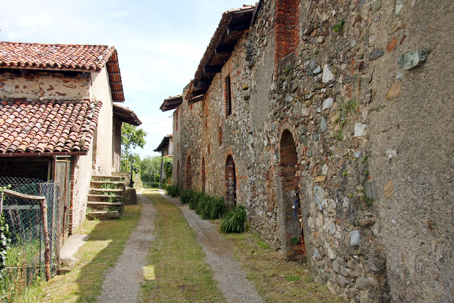 Scorcio del ricetto di Magnano (BI)